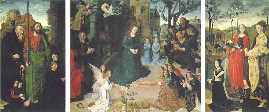 Portinari altarpiece